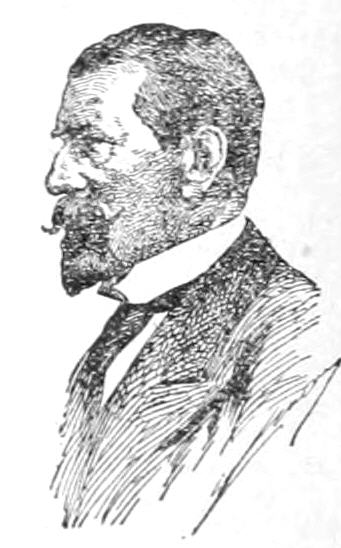 Woldemar Friedrich